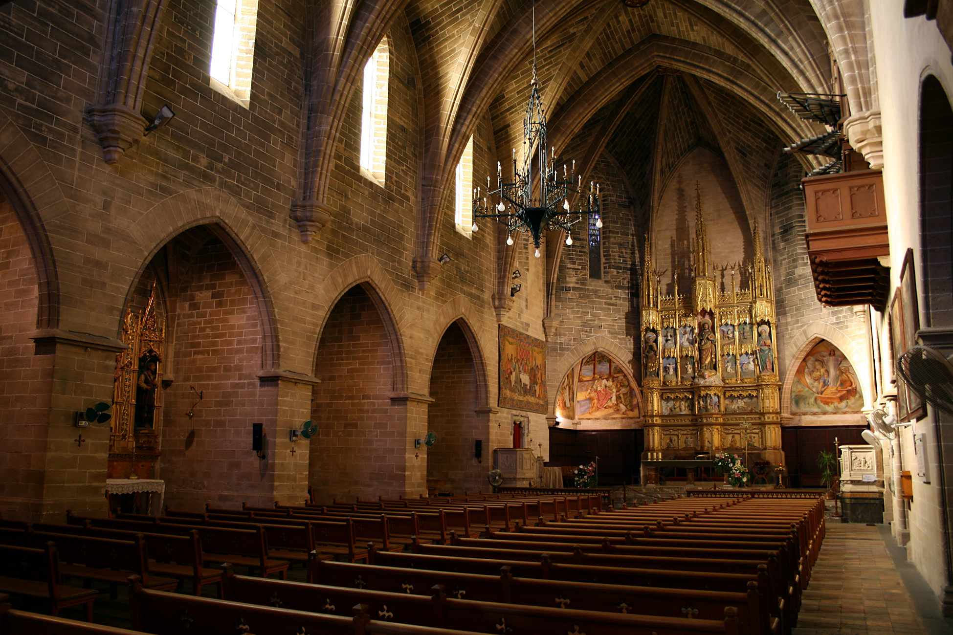 Iglesia de Sant Jaume, Alcúdia, Mallorca, Spain